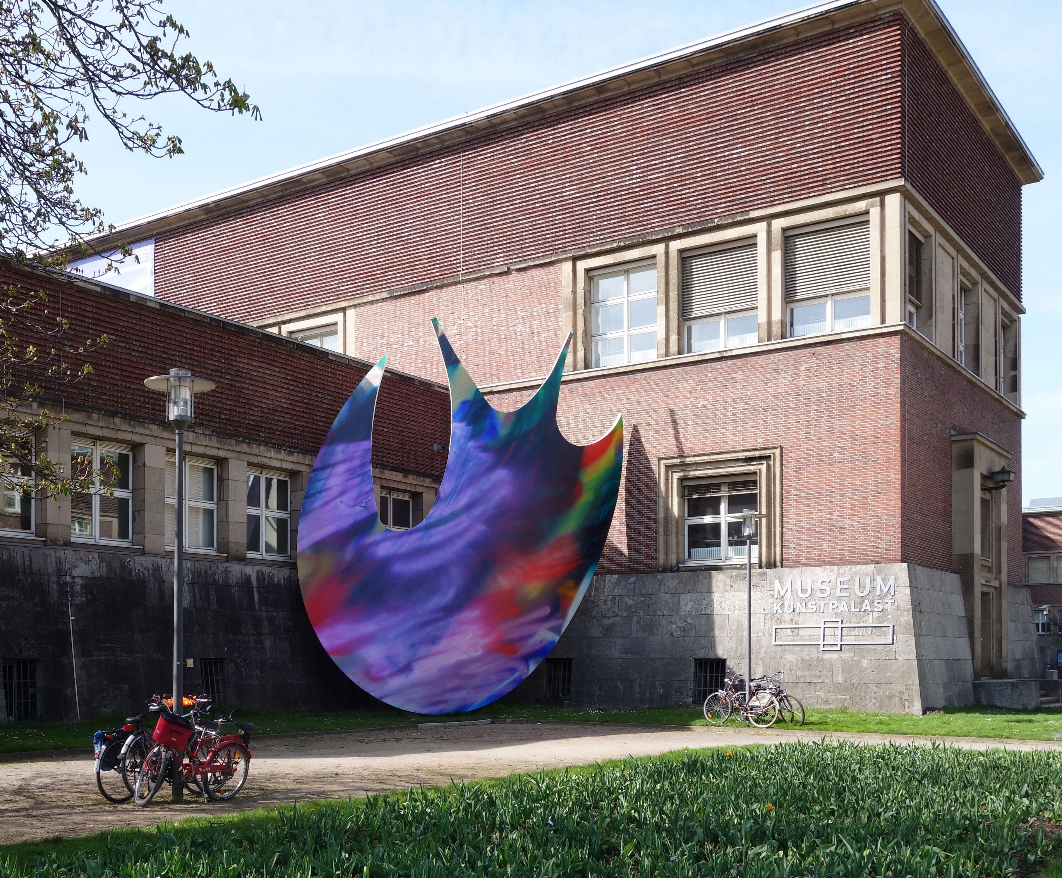 Ellipse von Katharina Grosse, Professorin an der Düsseldorfer Kunstakademie. Dauerhafter Neuerwerb für den Düsseldorfer Ehrenhof. Das große Oval entstand 2009. Es ist aus GFK (Glasfaser verstärktem Kunststoff) gearbeitet. abgerufen am 20. Oktober 2014